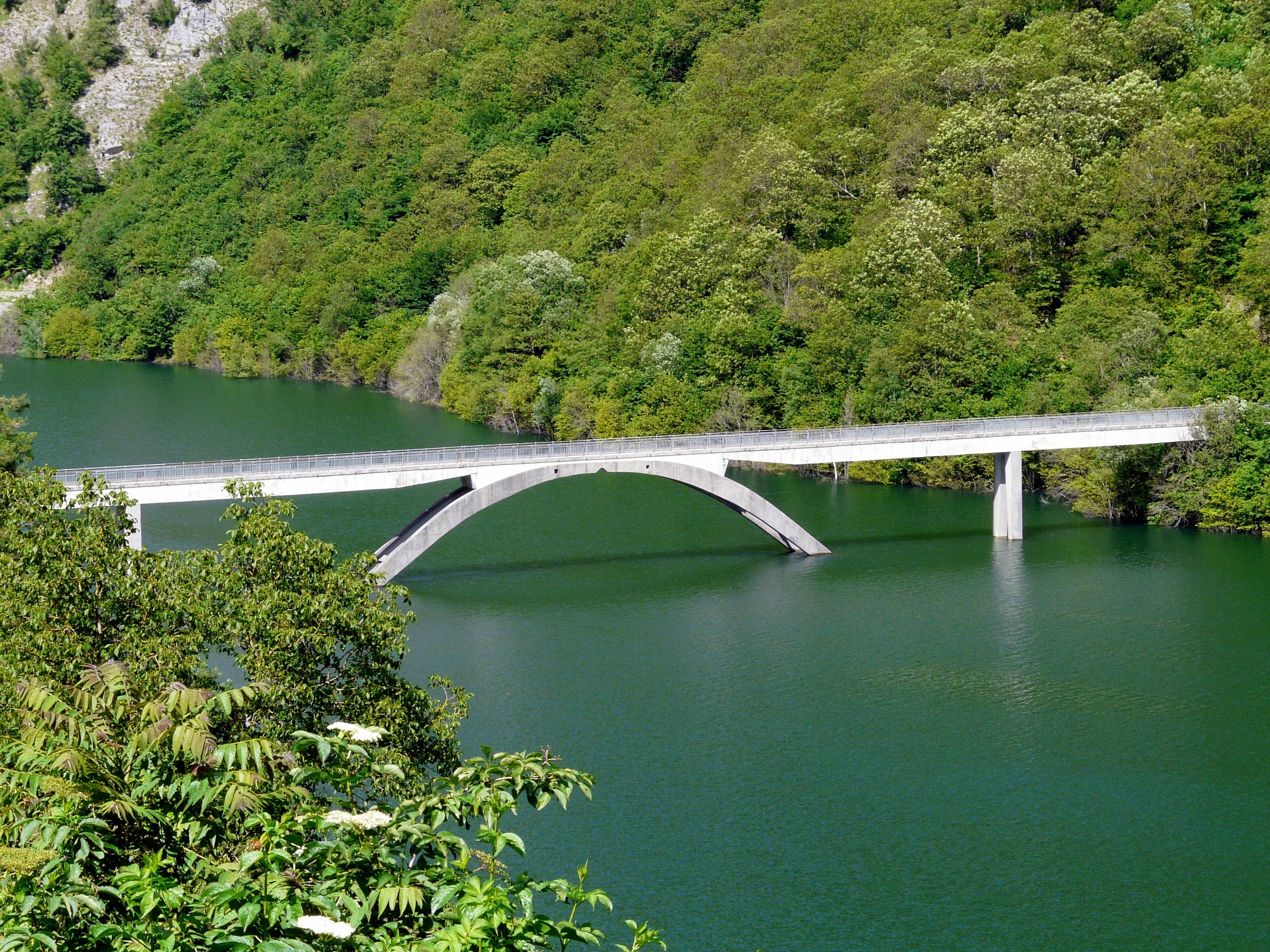 Lago di Vagli, Vagli Sotto, Toscana, Italia